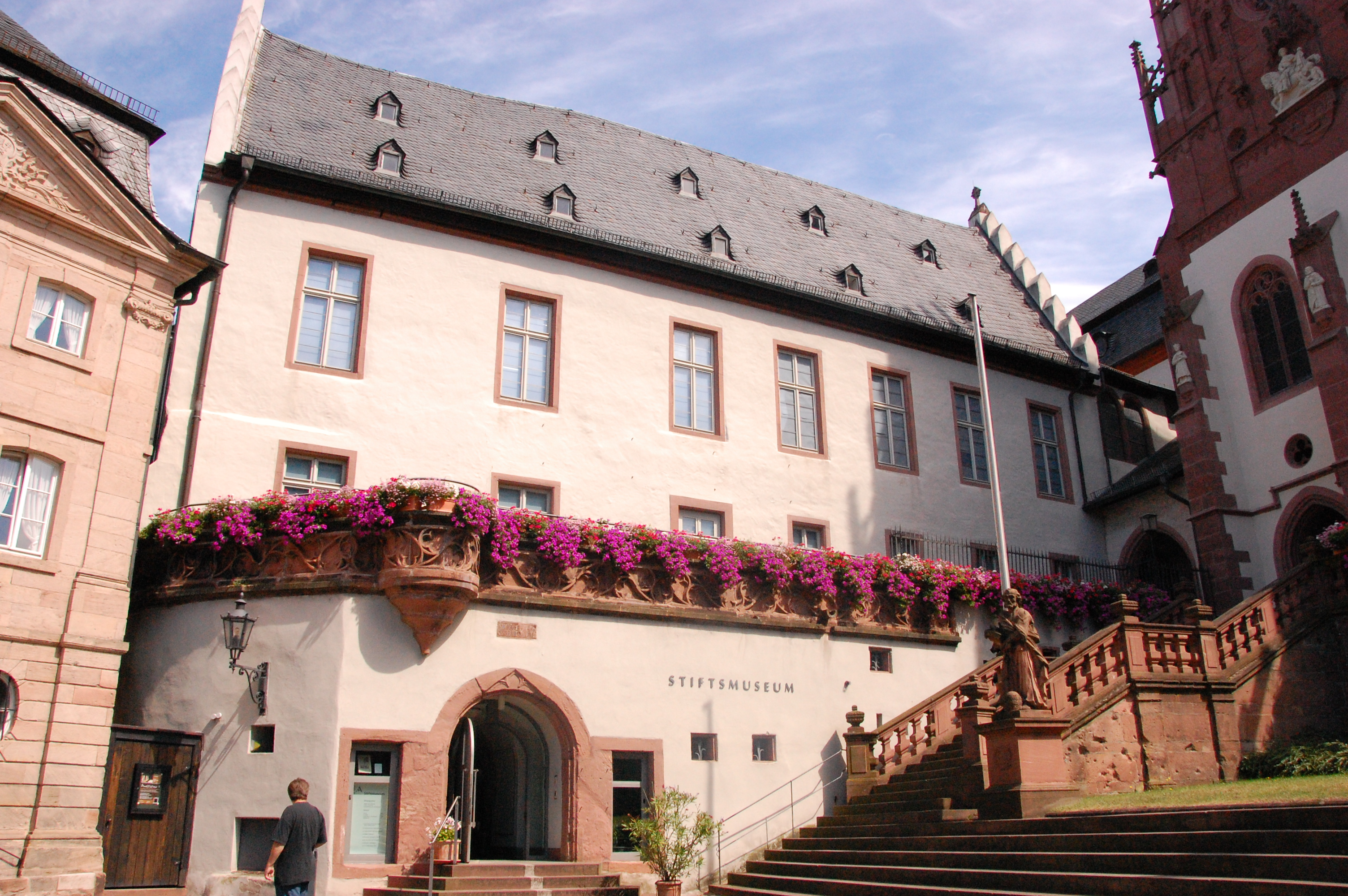 Das Stiftsmuseum beinhaltet eine große Sammlung von antiken römischen Gegenständen. Außerdem sind dort noch viele religiöse Skulpturen und Gemälde zu besichtigen.